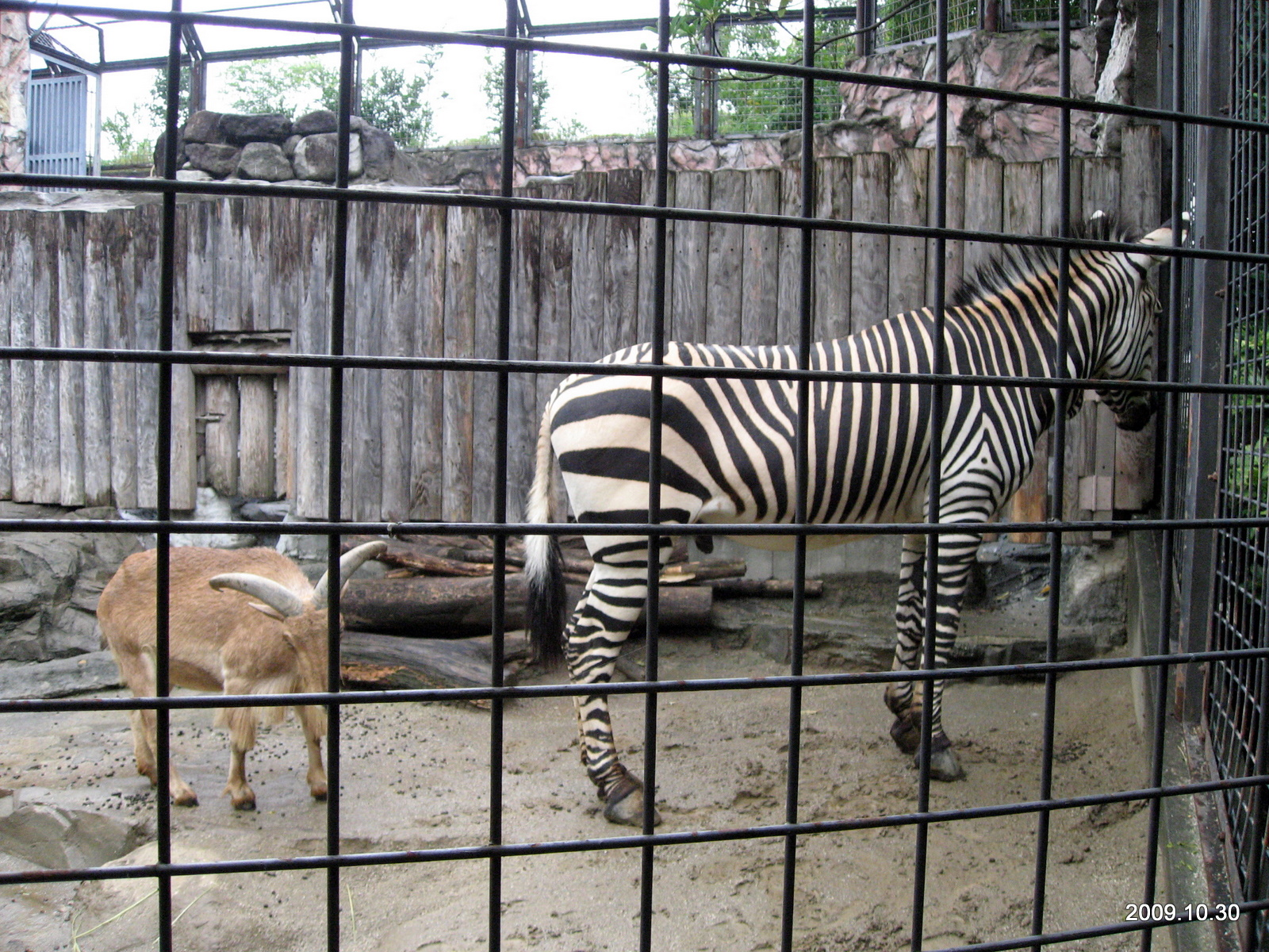 上野動物公園, Ueno Zoo（Ueno Zoological Gardens）